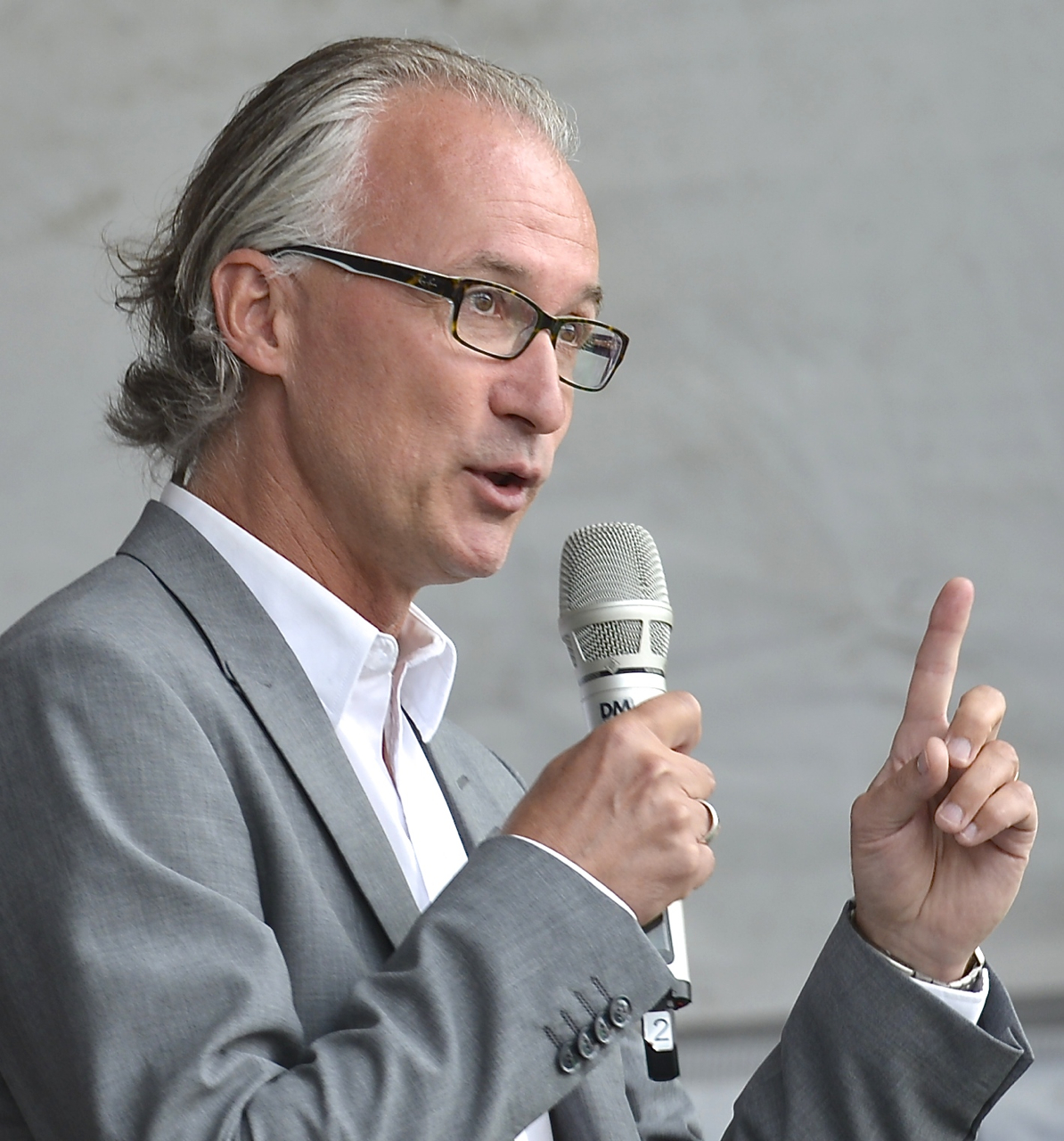 DN-konserten med Kungliga Filharmonikerna på Gärdet vid Sjöhistoriska museet den 17 augusti 2014. Årets solist är sångerskan Lisa Nilsson. Värd är konserthuschef Stefan Forsberg. Dirigent är David Björkman.